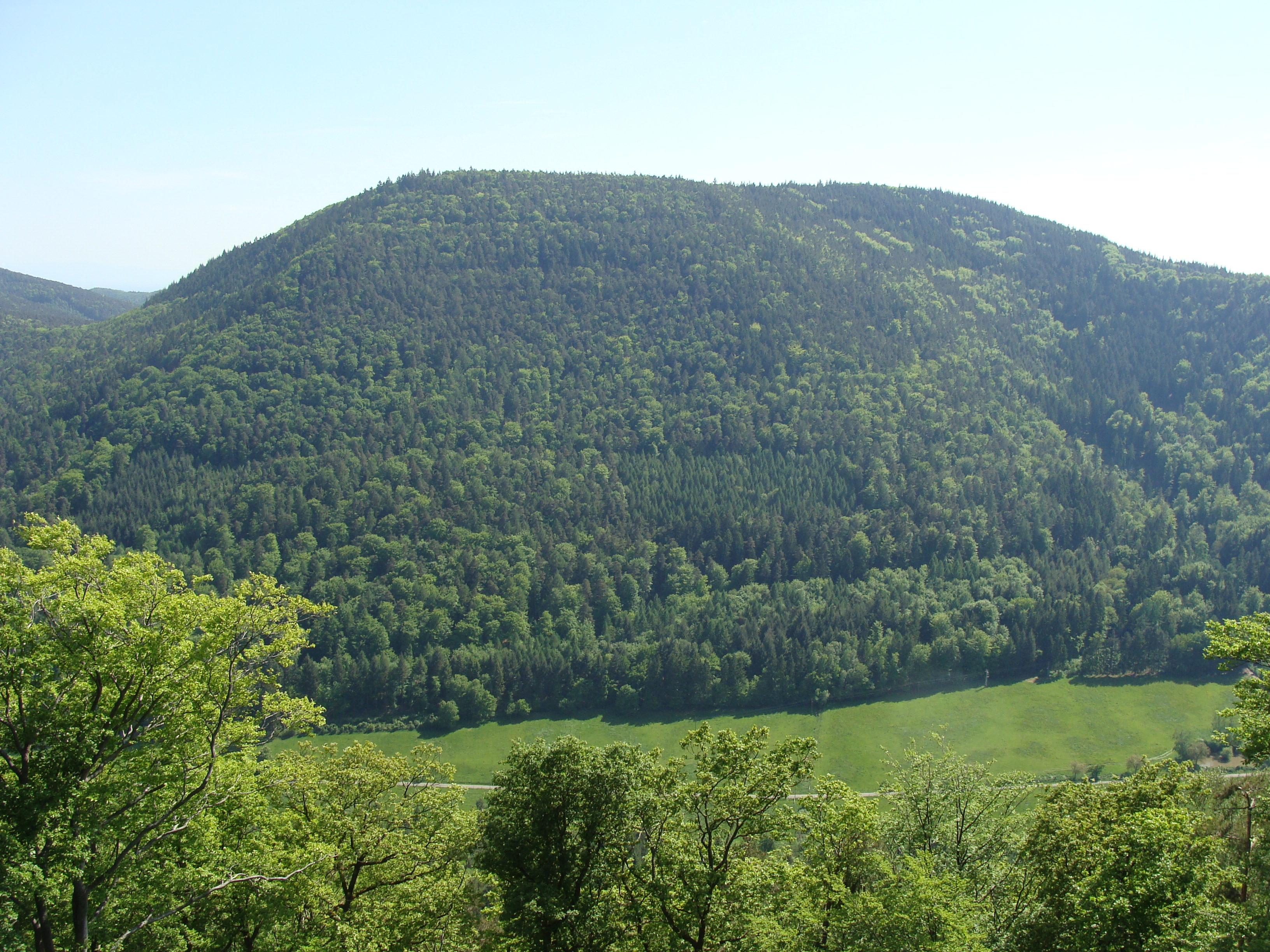 Roßberg (Pfälzerwald) - Blick vom Frankenfelsen